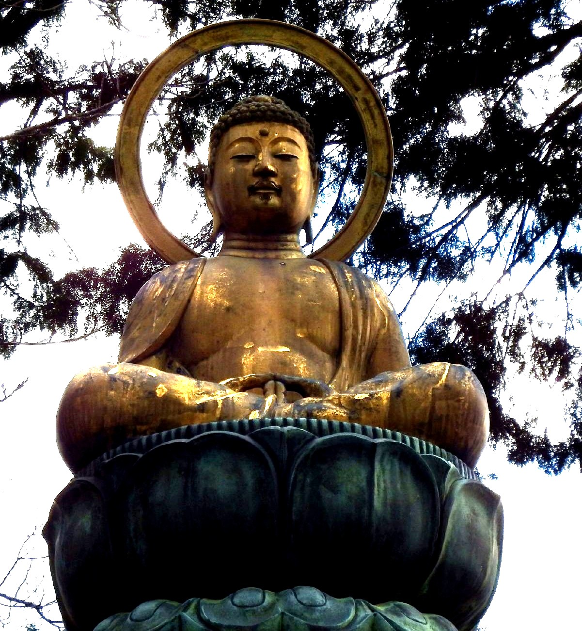 十楽寺の本尊写し仏